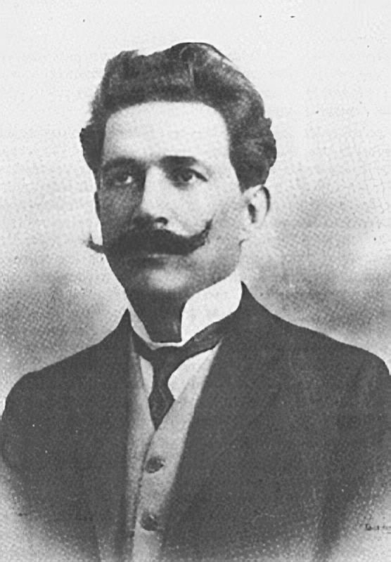 Manuel Bomfim